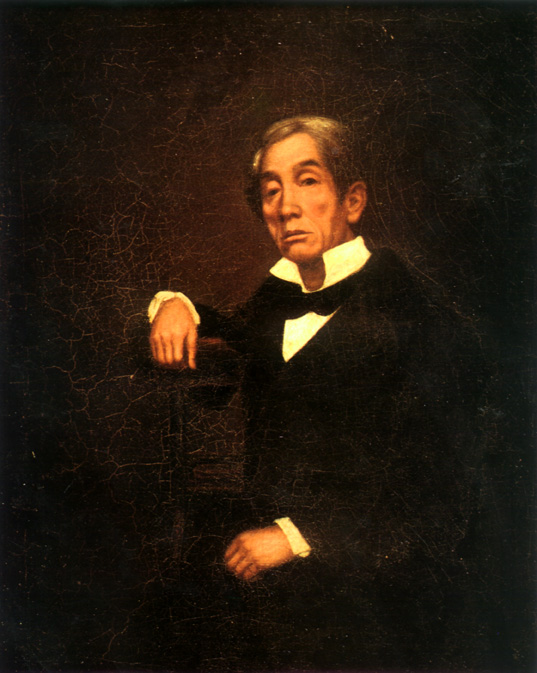 The Macanese, Miguel António de Cortela